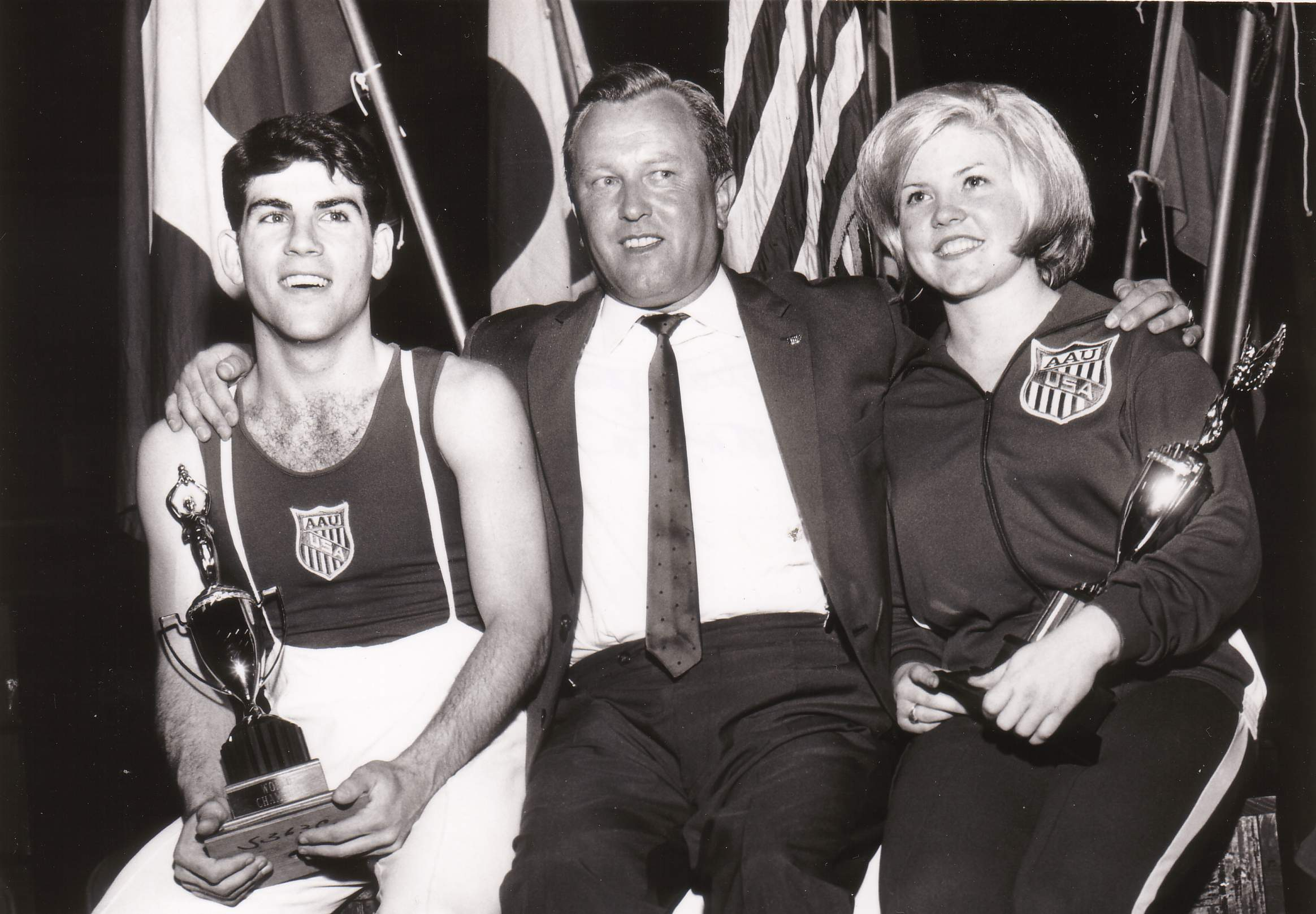 Wayne Miller 1966 bei den World Trampoline Championships (mit Judy Wills with FIT President Rene Schaerer)